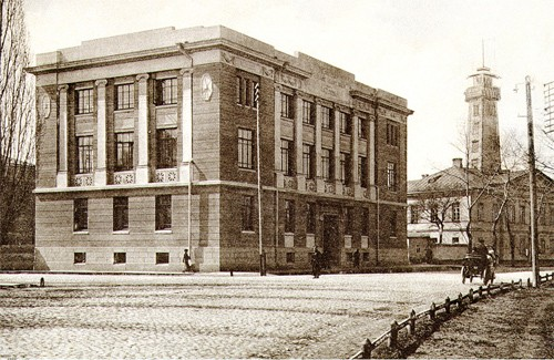 Будівля Полтавської жіночої художньо-ремісничої школи.